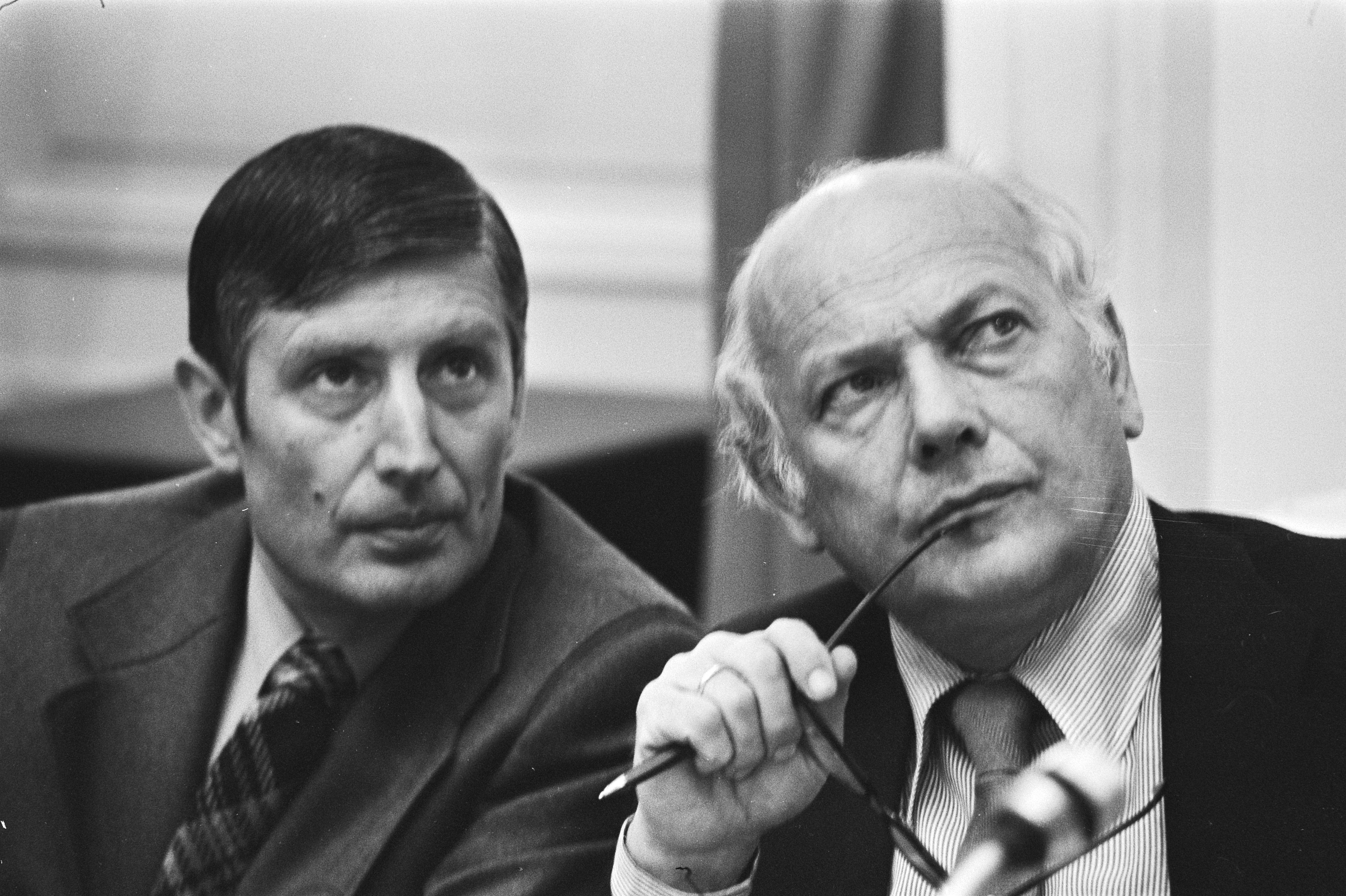 Collectie / Archief : Fotocollectie Anefo Reportage / Serie : [ onbekend ] Beschrijving : Kamerdebat over gijzelingen; Van Agt (l) met Den Uyl Datum : 23 juni 1977 Trefwoorden : gijzelingen, kamerdebatten Persoonsnaam : Uyl, Joop den Fotograaf : Verhoeff, Bert / Anefo Auteursrechthebbende : Nationaal Archief Materiaalsoort : Negatief (zwart/wit) Nummer archiefinventaris : bekijk toegang 2.24.01.05 Bestanddeelnummer : 929-2401